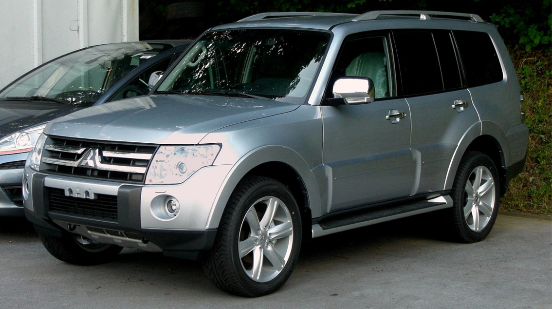 Mitsubishi Pajero (V80)